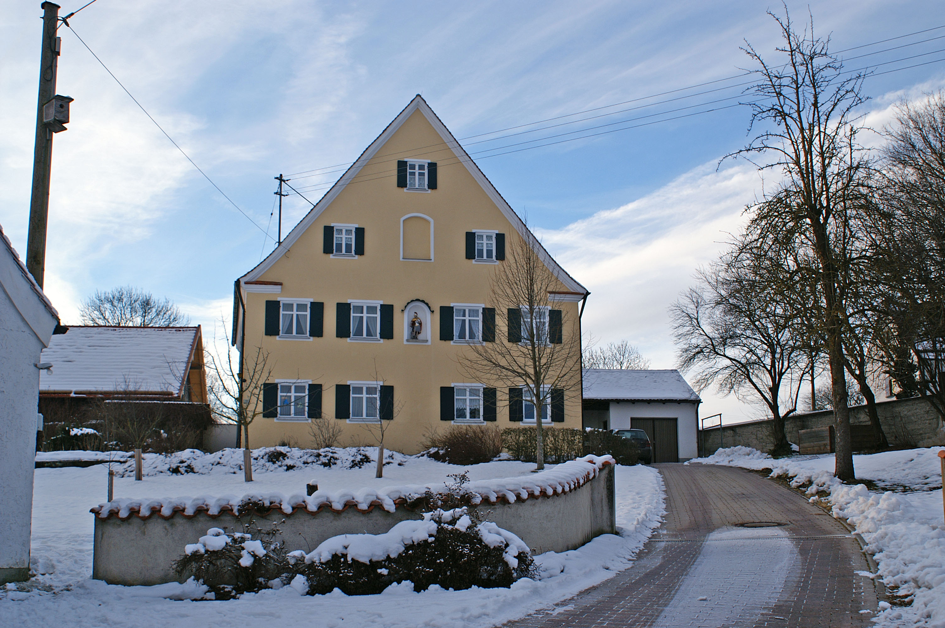 Pfarrhof in Reichling